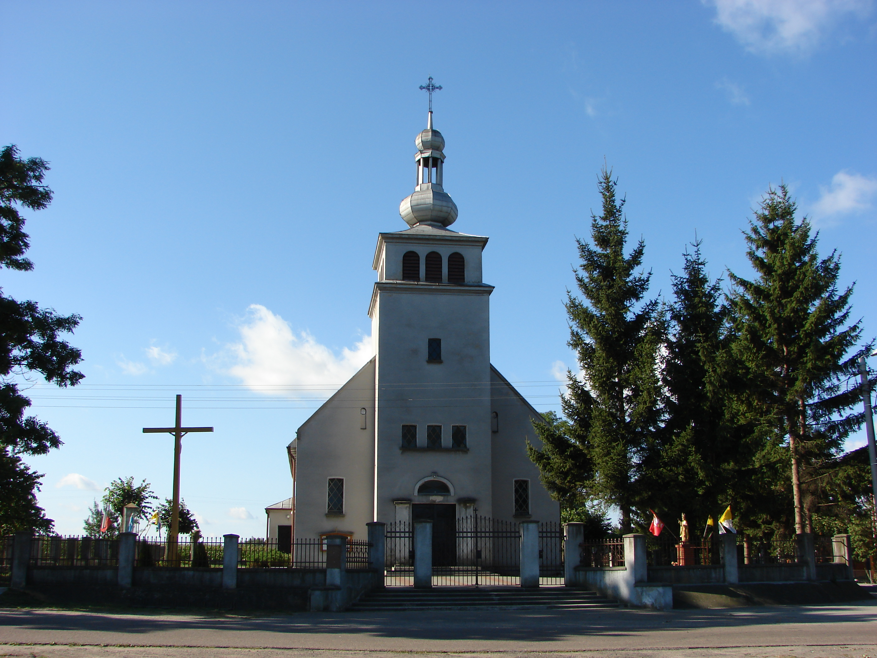 Kościół w Lubominie, kujawsko-pomorskie.